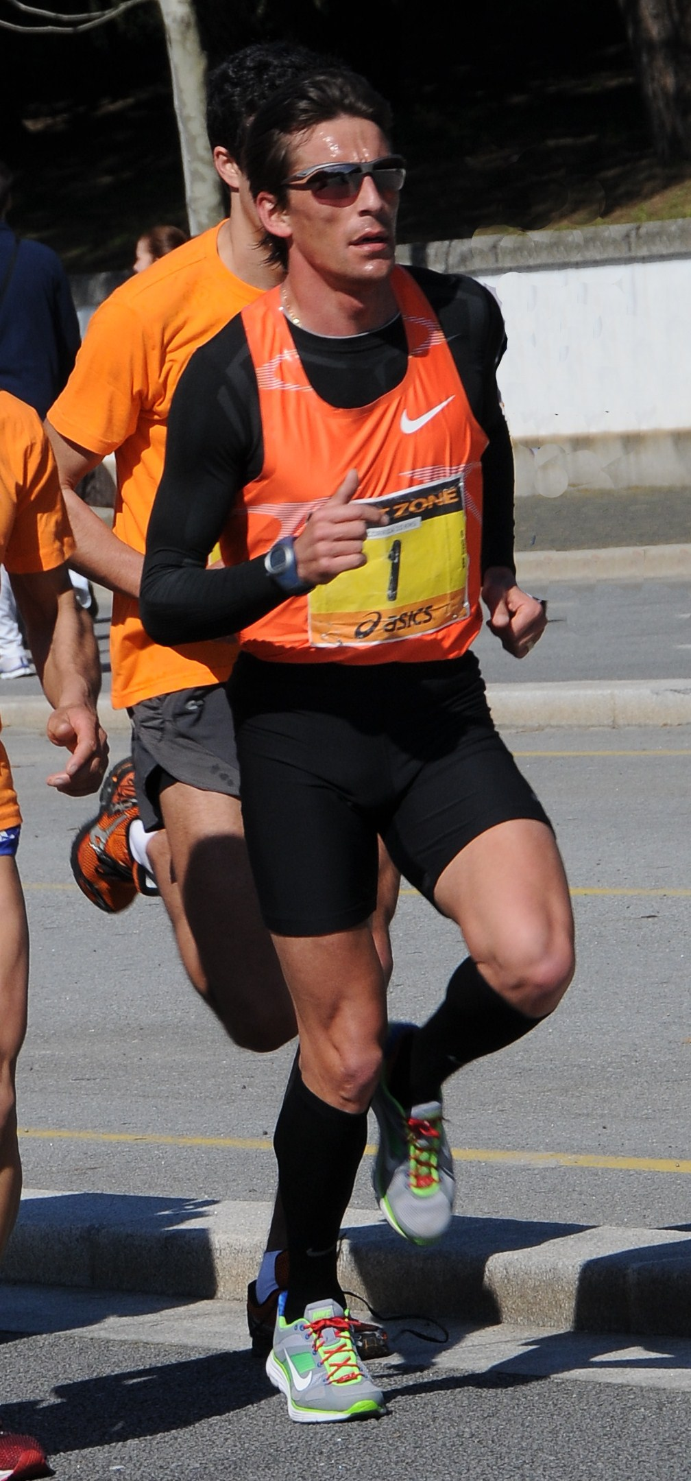 O atleta Rui Silva em competição na Prova "Corrida do Dia do Pai" na Avenida da Boavista, Porto Portugal. Nesta prova de 10km, o atleta completou a prova em 31min42seg.